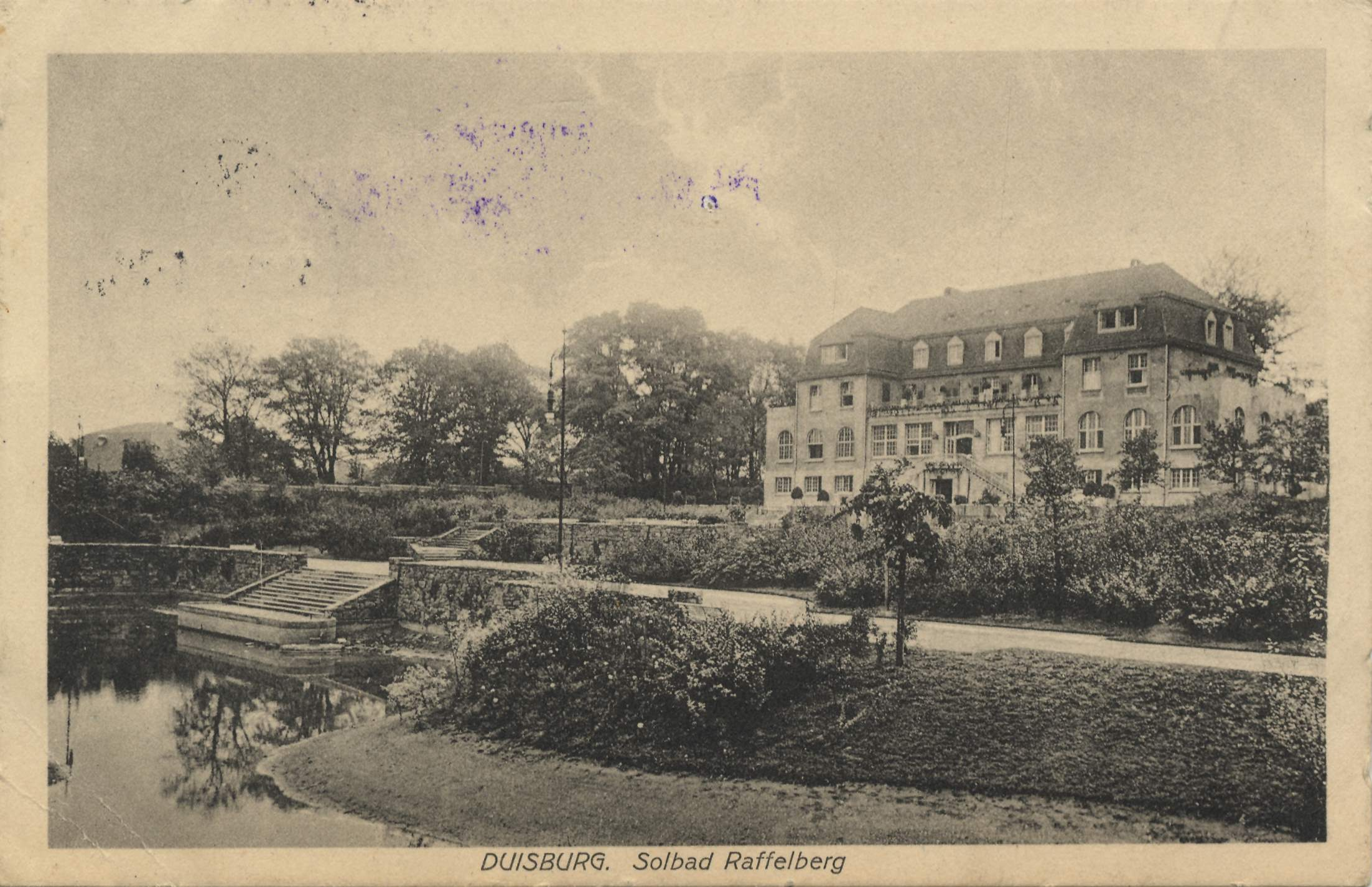 Historische Postkarte von Duisburg aus dem Verlag: Cramers Kunstanstalt, Dortmund, von 1915